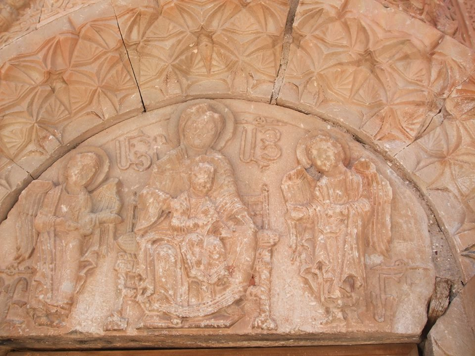 Նորավանքը 13-րդ դարի սկզբին եղել է Սյունիքի հոգևոր կենտրոնը, Օրբելյան իշխանական տան տոհմական տապանատունը։ Այստեղ 12-րդ դարի 2-րդ կեսին գործել է ճարտարապետ Սիրանեսը, XIVդ. 1-ին կեսին՝ նշանավոր մանրանկարիչ, քանդակագործ և ճարտարապետ Մոմիկը։ Վանքի պարսպապատ տարածքում են Ս.Կարապետ գլխավոր եկեղեցին, նրան արևմուտքից կից՝ գավիթը, հյուսիսից՝ Սմբատ իշխանի դամբարանը։ Կառույցների գլխավոր խմբից հարավ-արևելք Բուրթել իշխանի երկհարկ դամբարան-եկեղեցին է։ Արևմտյան կողմում պահպանվել են նաև առանձին շենքերի մնացորդներ, պարսպապատ տարածքից արևելք՝ կոպտատաշ քարից կառուցված երկու մատուռներ և այլ շենքերի հիմնապատեր։ 8.1/1.1